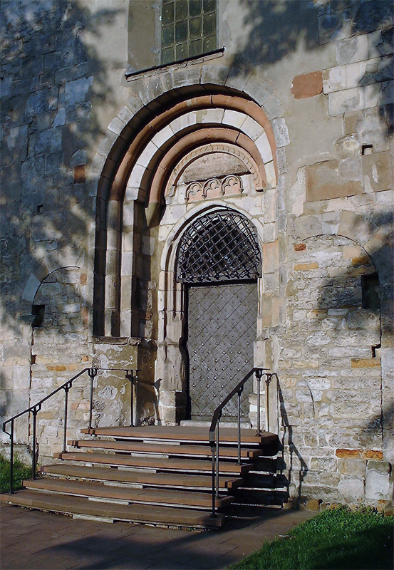 Opatów kolegiata - portal